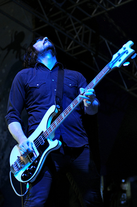 Jesse F. Keeler Parklife Festival 2011